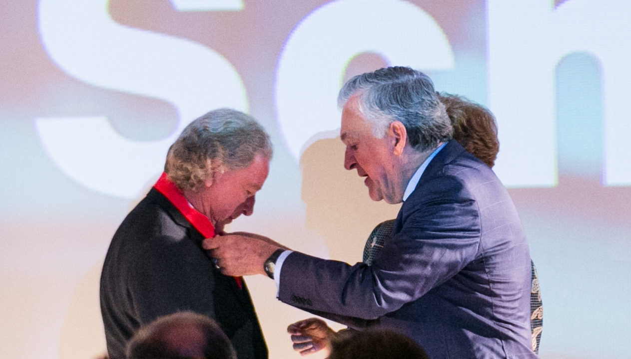 Aldyr Garcia Schlee (Jaguarão, 22 de novembro de 1934) é escritor, jornalista, tradutor, desenhista e professor universitário brasileiro. As suas especialidades são a criação literária, a literatura uruguaia e gaúcha, a identidade cultural e as relações fronteiriças. Na foto, recebe no Ministério da Cultura, a Ordem do Mérito Cultural (2015).